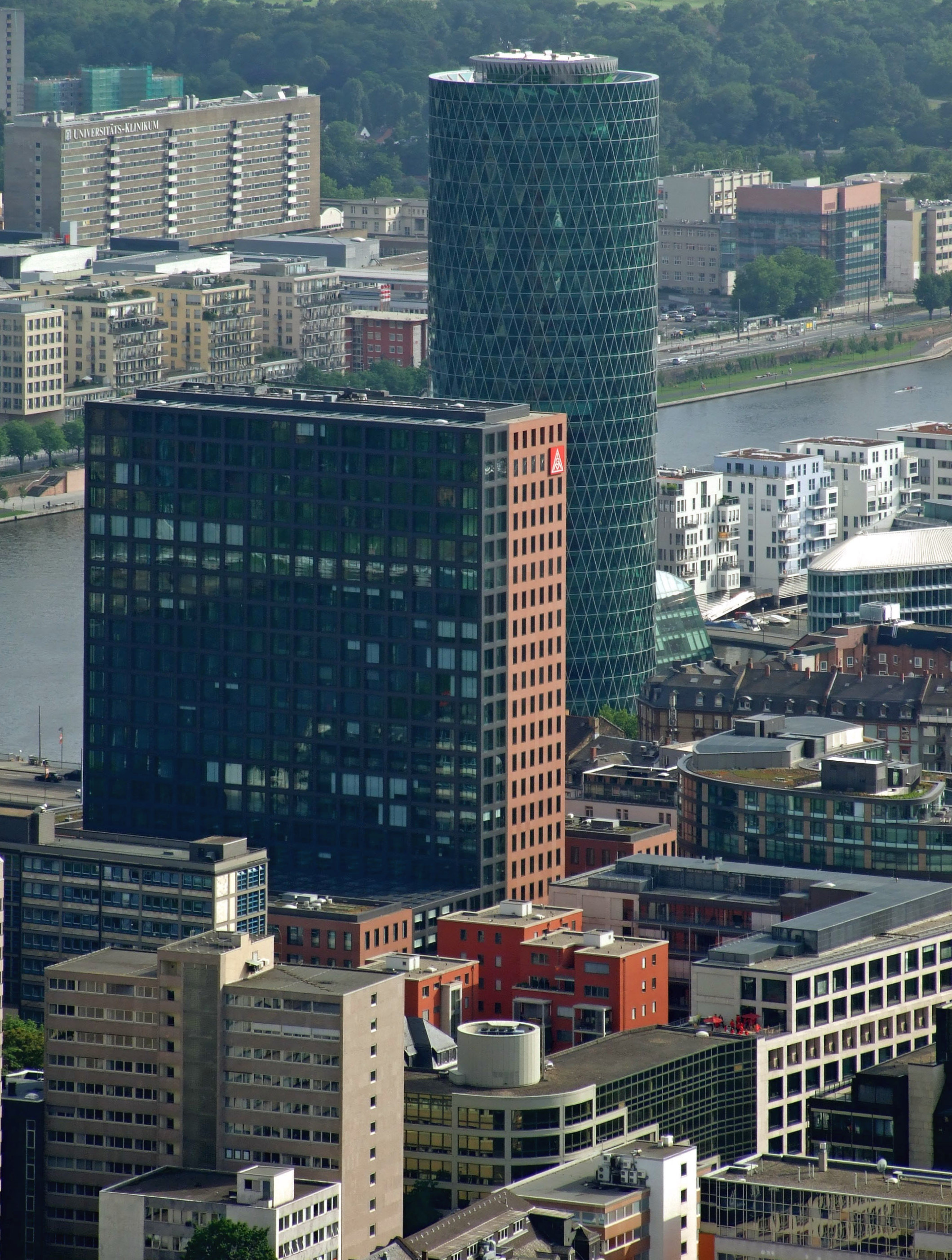 IG-Metall Verwaltung vor Westhafen Tower und Uniklinikum